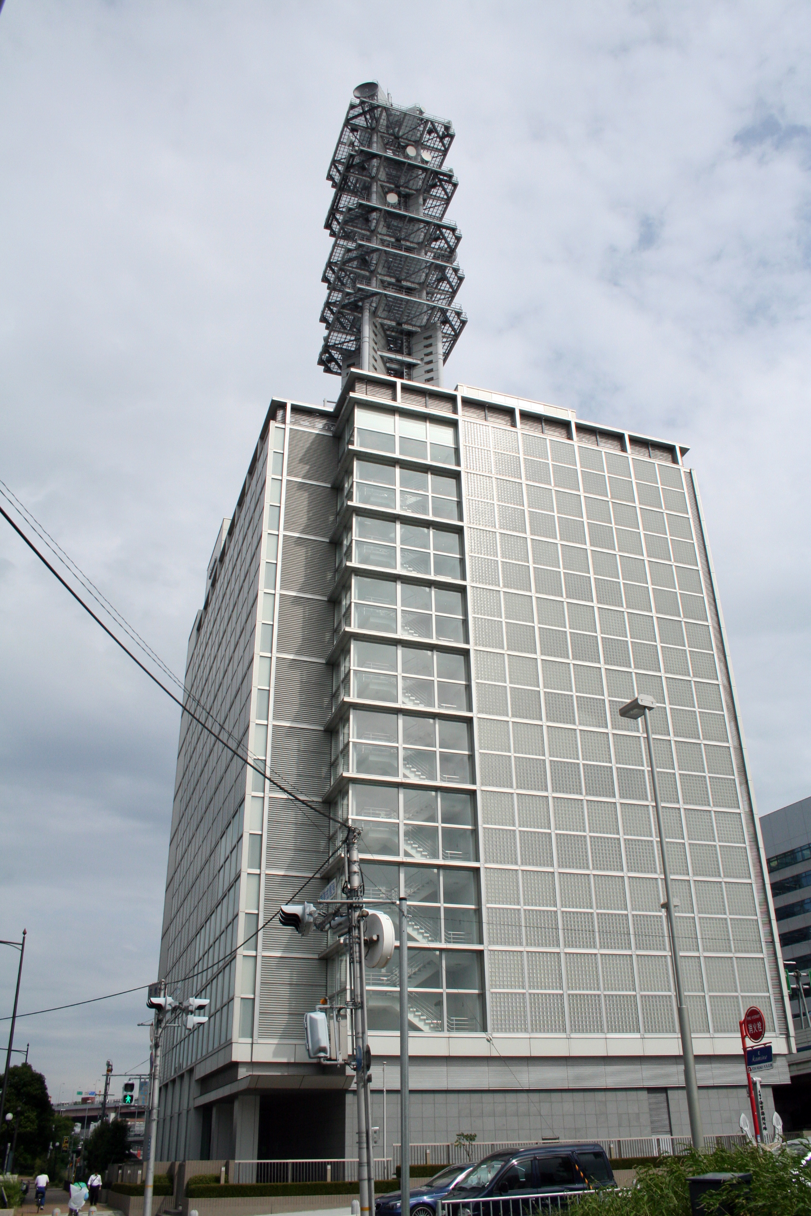 兵庫県神戸市中央区にある神戸市立博物館やその南を通る国道2号線(海岸通)沿いの町並み。 ドコモ神戸ビル。西側から撮影。